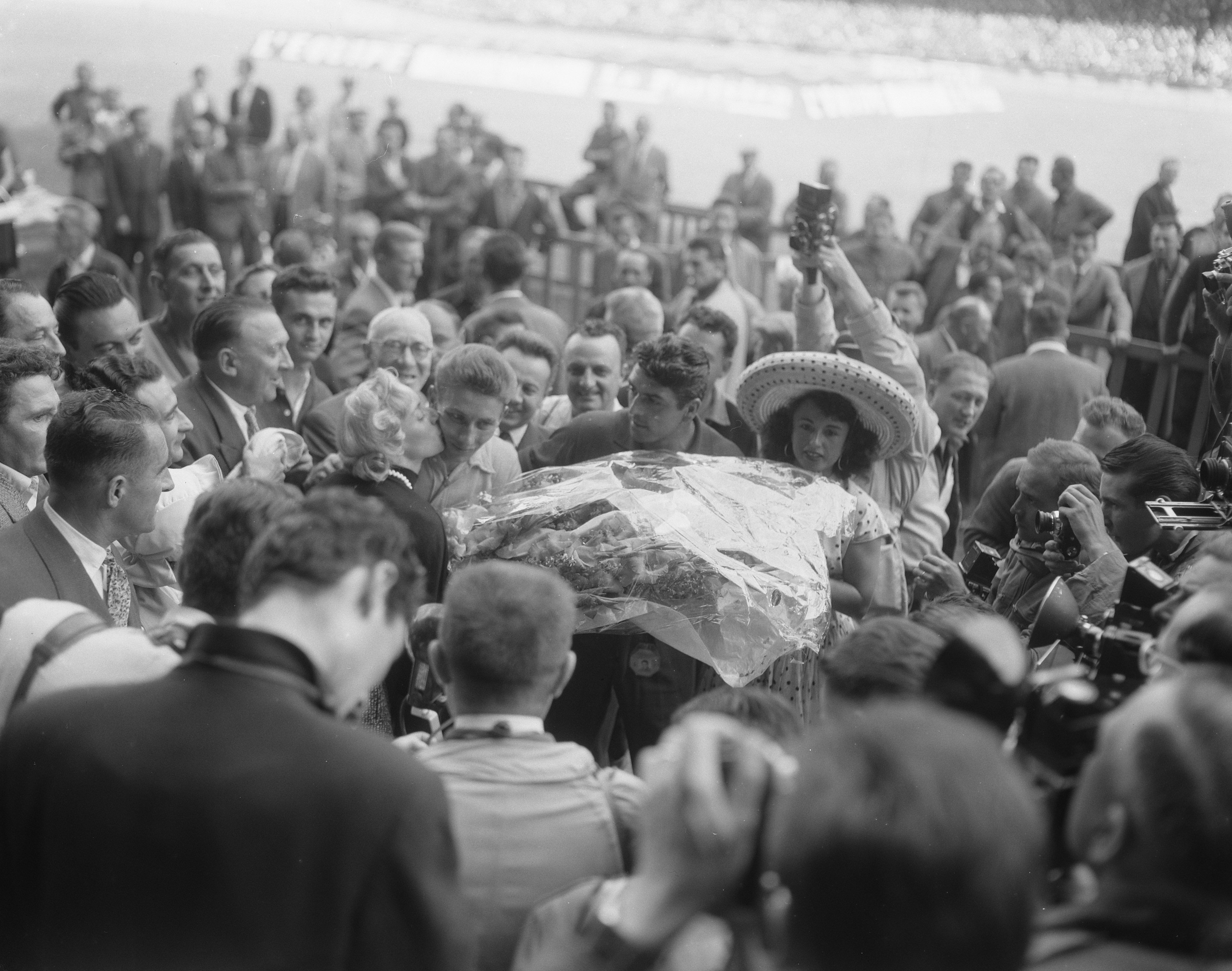 Collectie / Archief : Fotocollectie Anefo Reportage / Serie : Tour de France 1957 Beschrijving : Huldiging winnaar Jacques Anquetil Datum : 20 juli 1957 Locatie : Frankrijk, Parijs Trefwoorden : wielrenners, winnaars Persoonsnaam : Anquetil, Jacques Instellingsnaam : Parc des Princes-stadion Fotograaf : Pot, Harry / Anefo Auteursrechthebbende : Nationaal Archief Materiaalsoort : Negatief (zwart/wit) Nummer archiefinventaris : bekijk toegang 2.24.01.04 Bestanddeelnummer : 908-7910